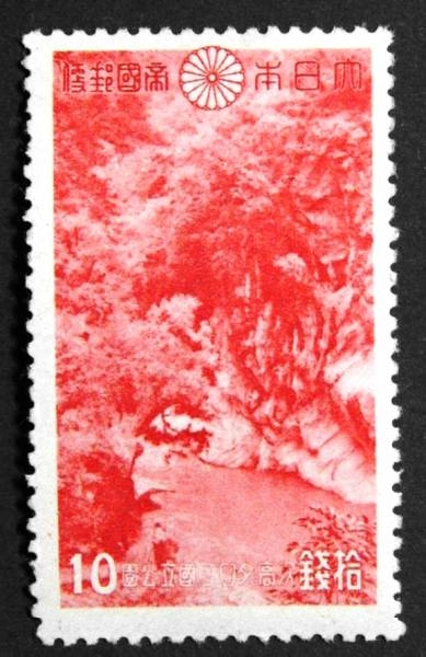 日本の植民地であった次高タロコ国立公園のうち、10銭切手